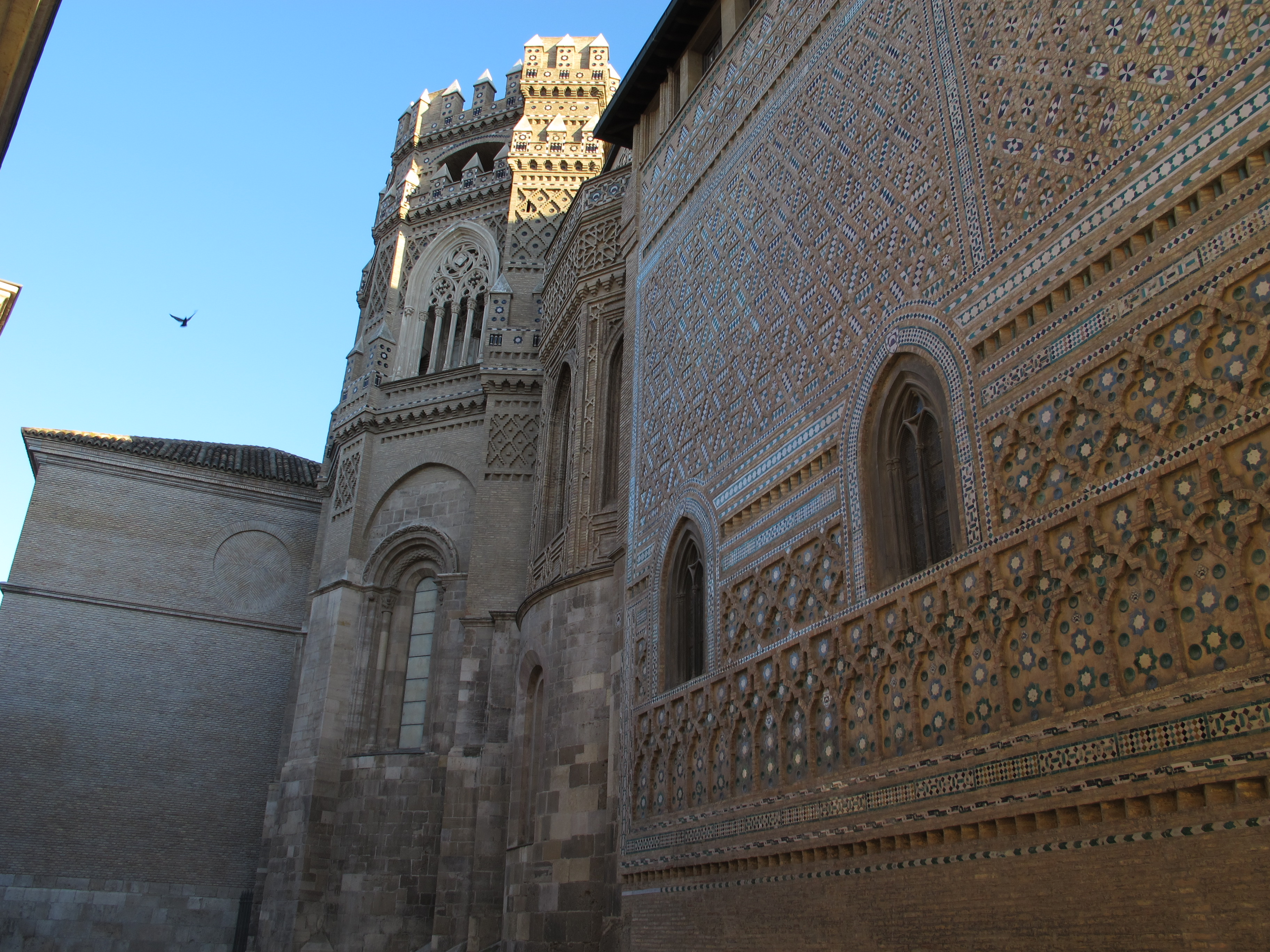 Zaragoza (Spanien): Alte Kathedrale ("La Seo"), Apsiden und Außenmauer im Mudéjar-Stil